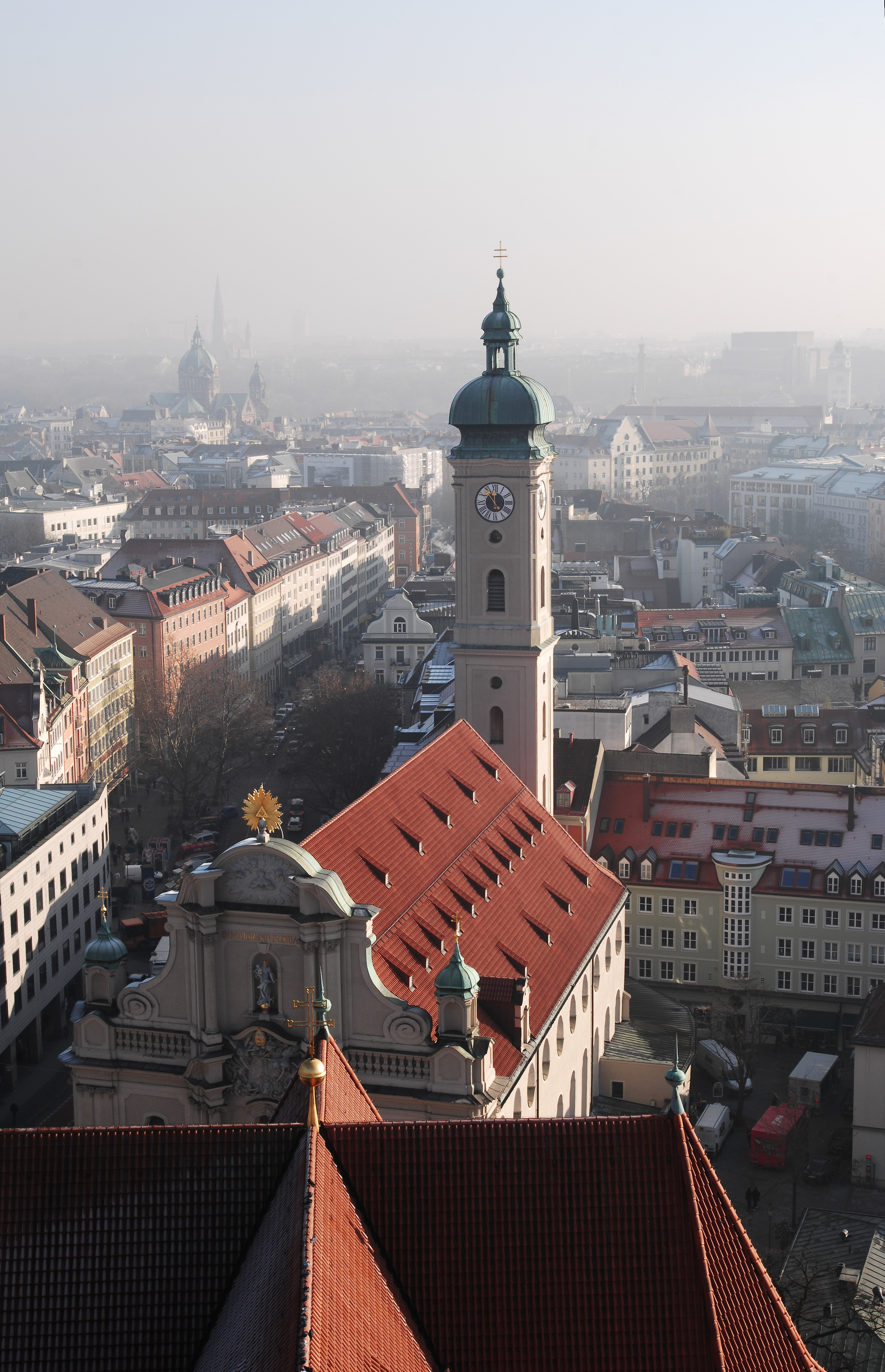 München. Blick vom Turm der Peterskirche auf die Heilig-Geist-Kirche.